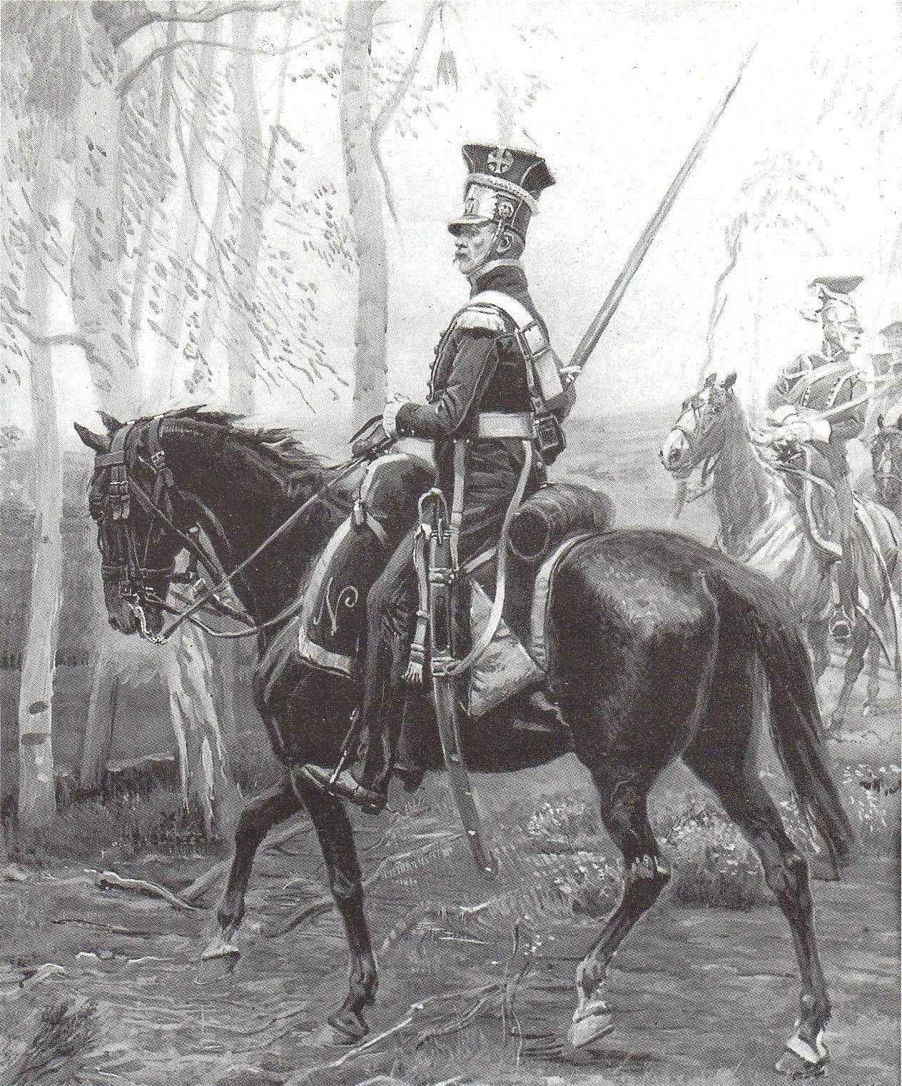 Chevau-léger lancier polonais du 1er régiment de la Garde impériale.